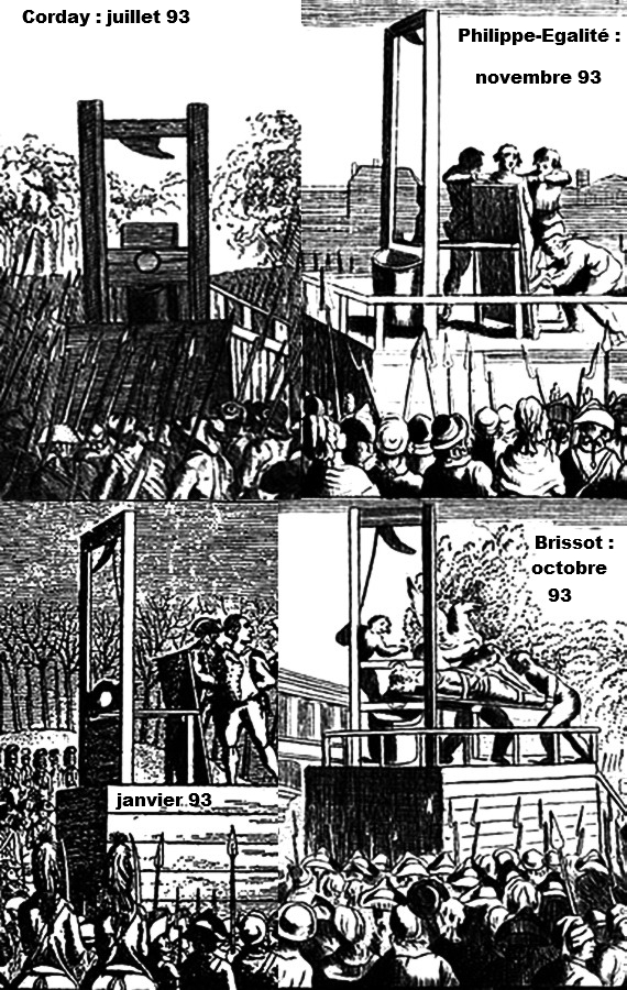 composition de 4 gravures représentant les premières lames de la guillotine